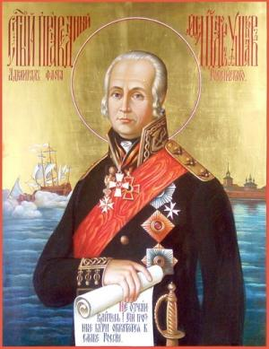 Святой праведный воин Феодор Ушаков